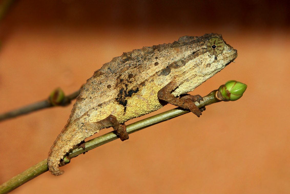 Rieppeleon brevicaudatus male